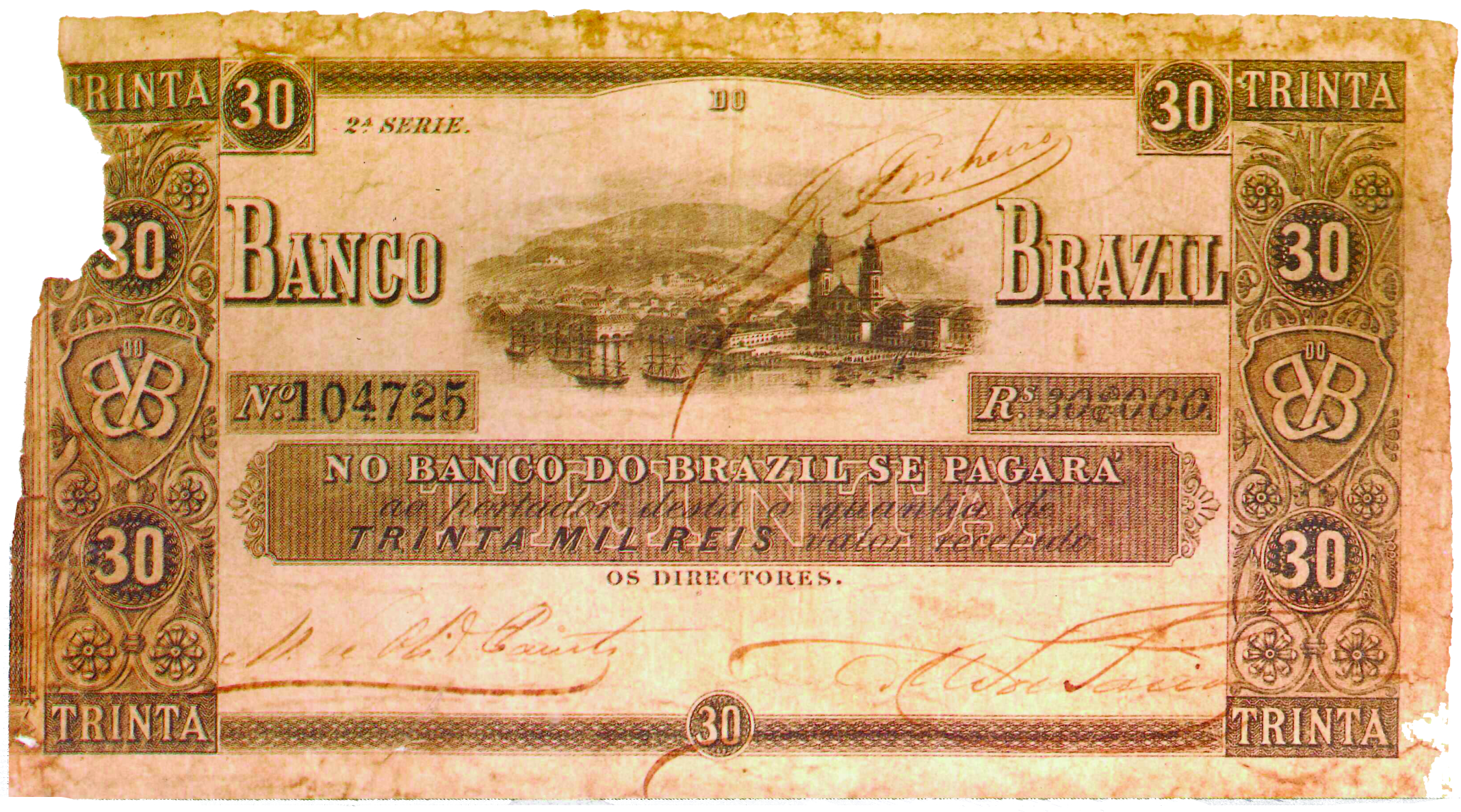 Cédula de 30 Réis emitida pelo Banco do Brasil em 1856 em que a imagem mostra o porto do Rio de Jnaeiro e edificações próximas. Também tem o emblema em dois escudos iguais com as iniciais B do B entrelaçadas.